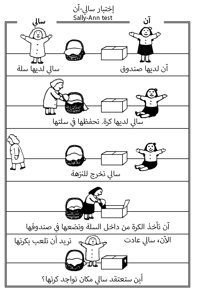 وصف لـ"إختبار سالي-آن" 1985